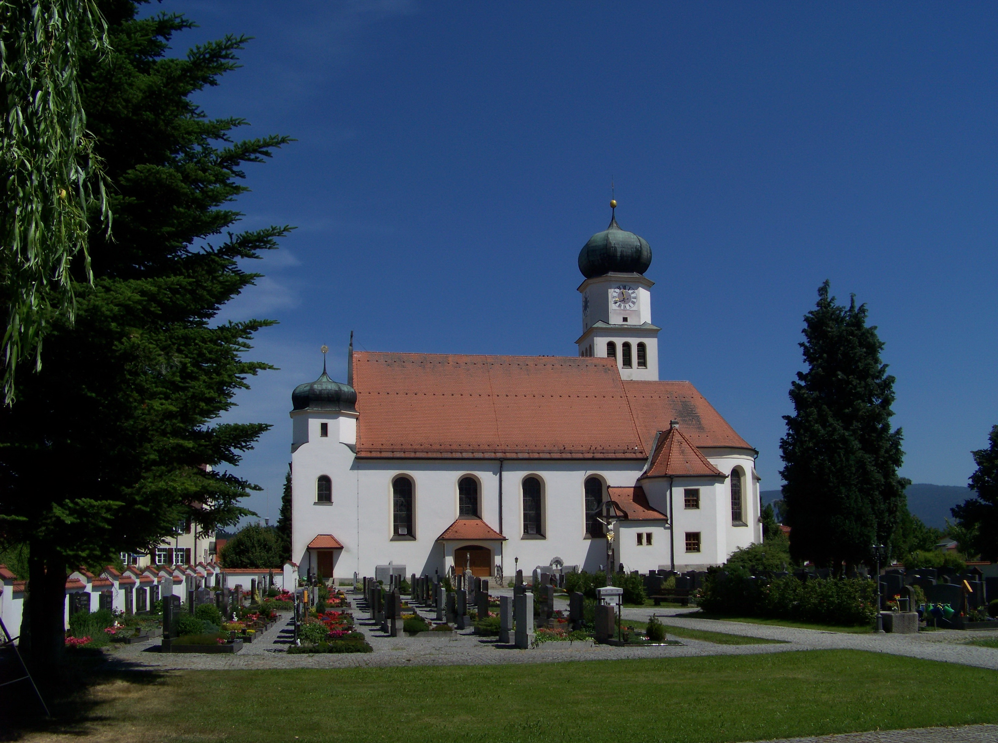 Niederwinkling, Oberwinkling, Sankt-Wolfgang-Straße 4. Katholische Pfarrkirche St. Wolfgang und Johannes d. T., erbaut 1908-10 von J. Rottler in neubarocken Formen; mit Ausstattung.